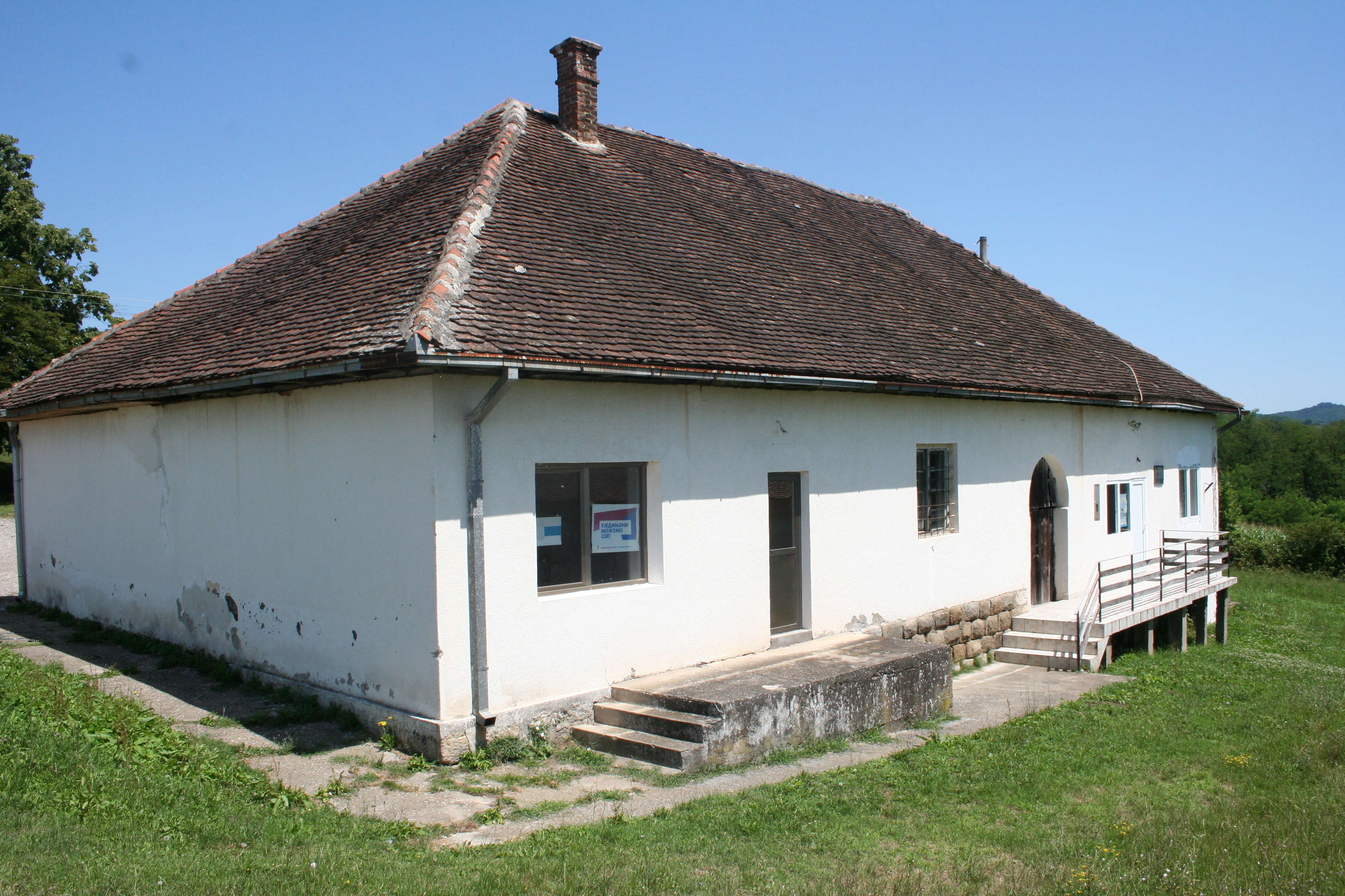 Zgrada MZ, Veliko Selo